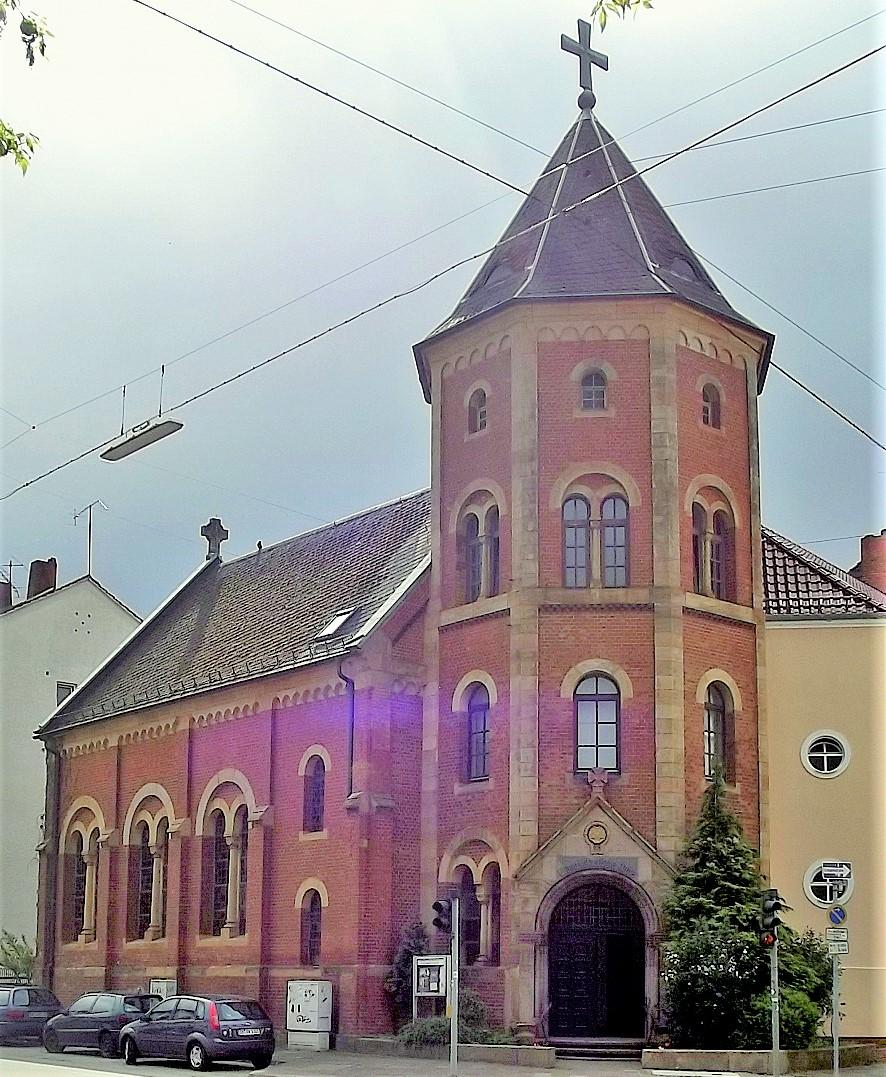 Exterior of the lutheran church in Saarbrücken, Saarland, Germany